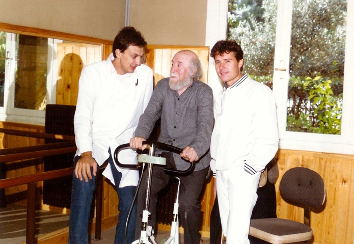 ΠΡοσαλίκας Τσαρούχης